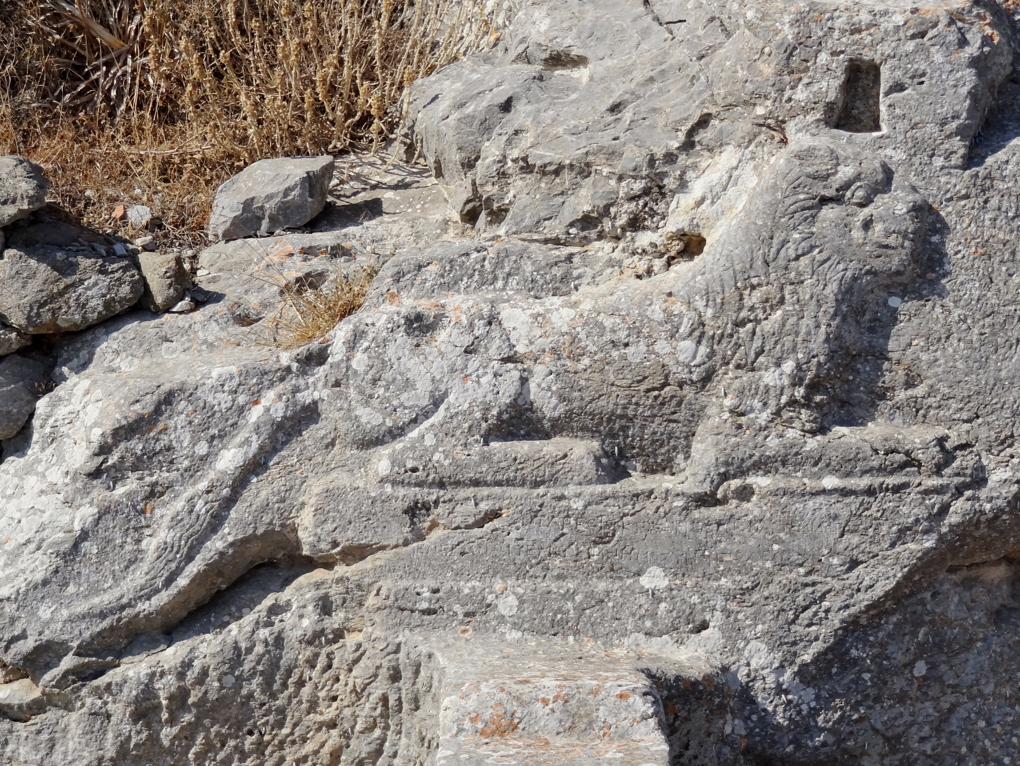 Temenos des Artemidoros in Alt-Thera, Santorin, Kykladen, Griechenland